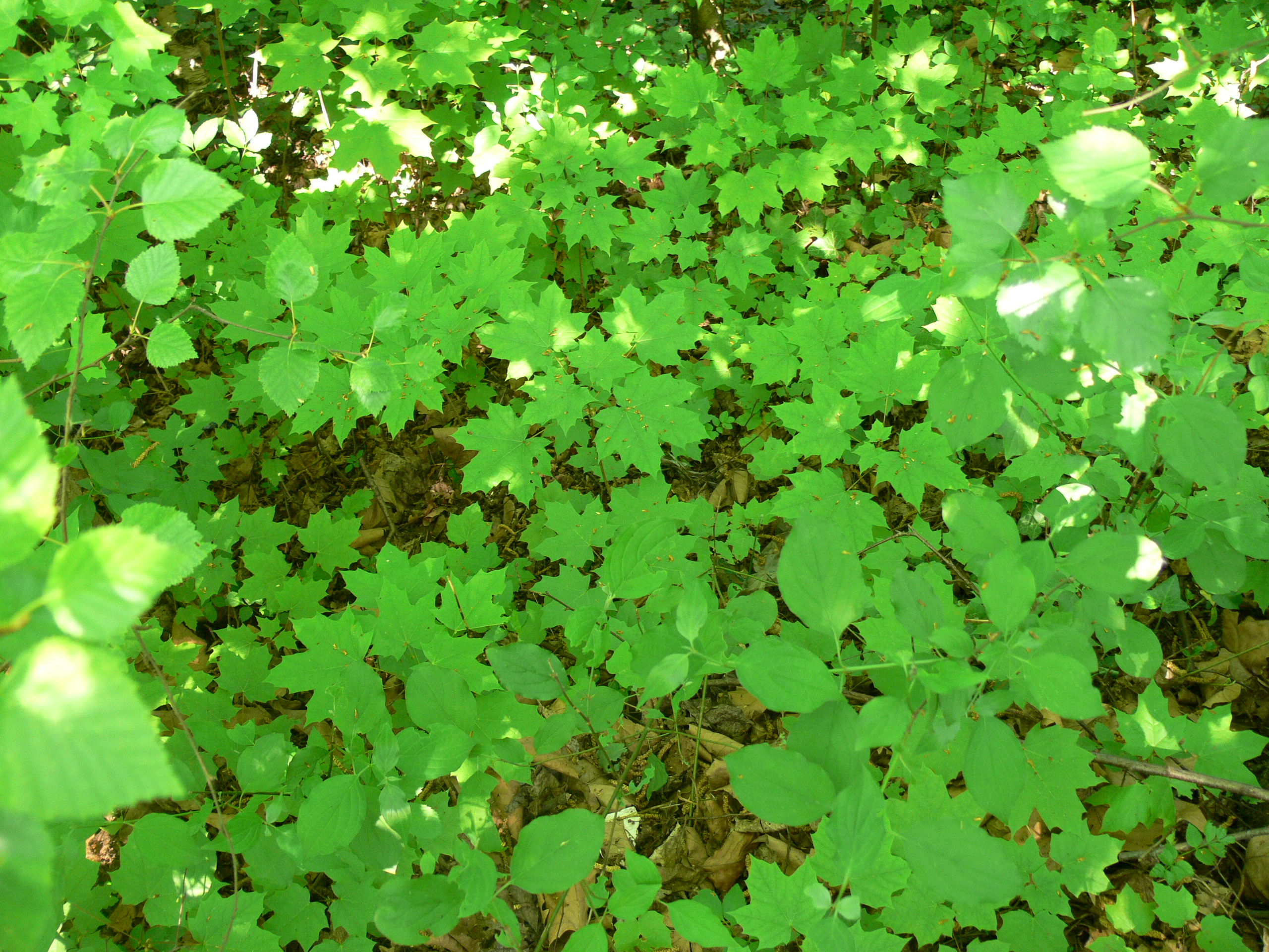 régénération naturelle, issus de semis naturel d'érable Acer platanoides, Nord de la France